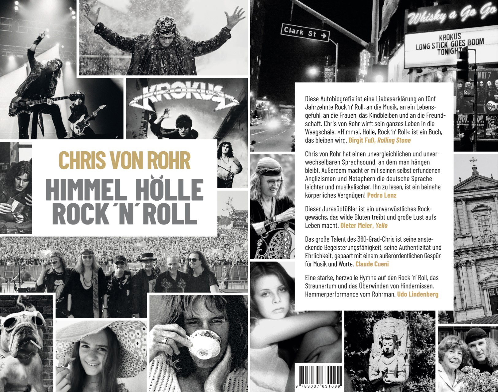 Die Datei zeigt Front- und Backcover der Autobiografie Himmel Hölle Rock 'n' Roll von Chris von Rohr.